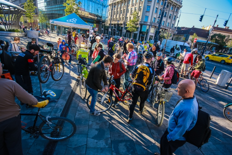 Magyar Kerékpárosklub Bringás reggeli 2015.09.22.